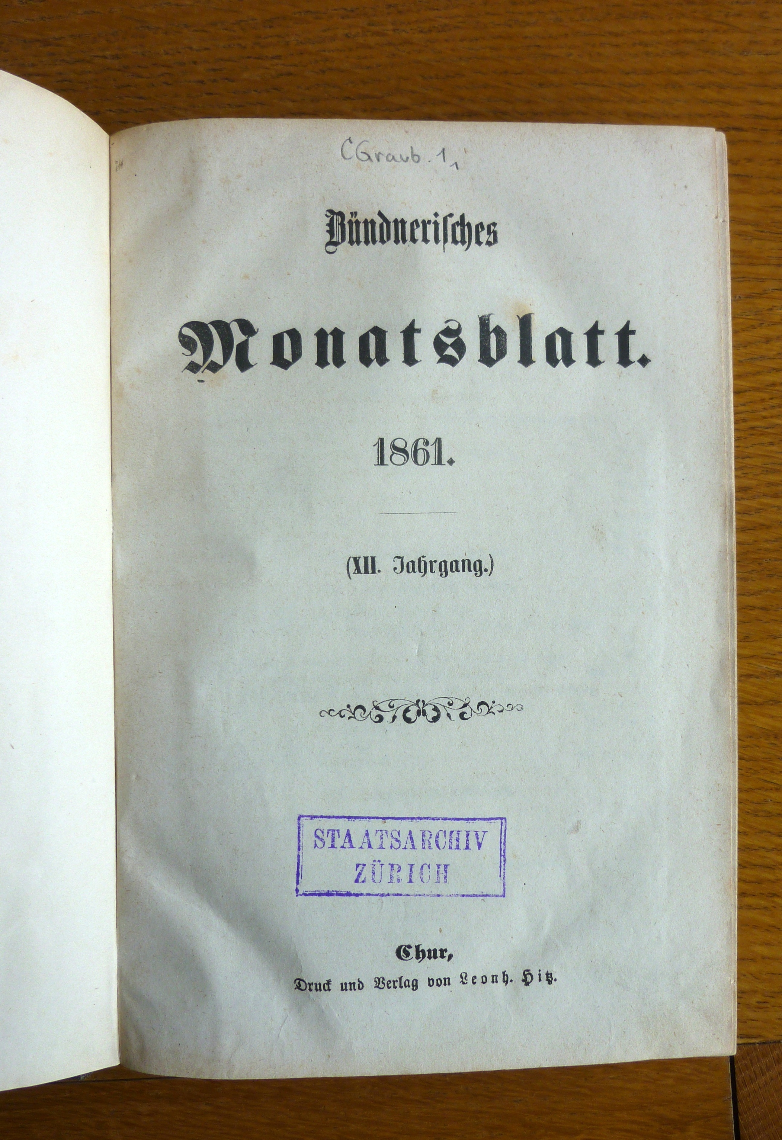 Bündner Monatsblatt1861